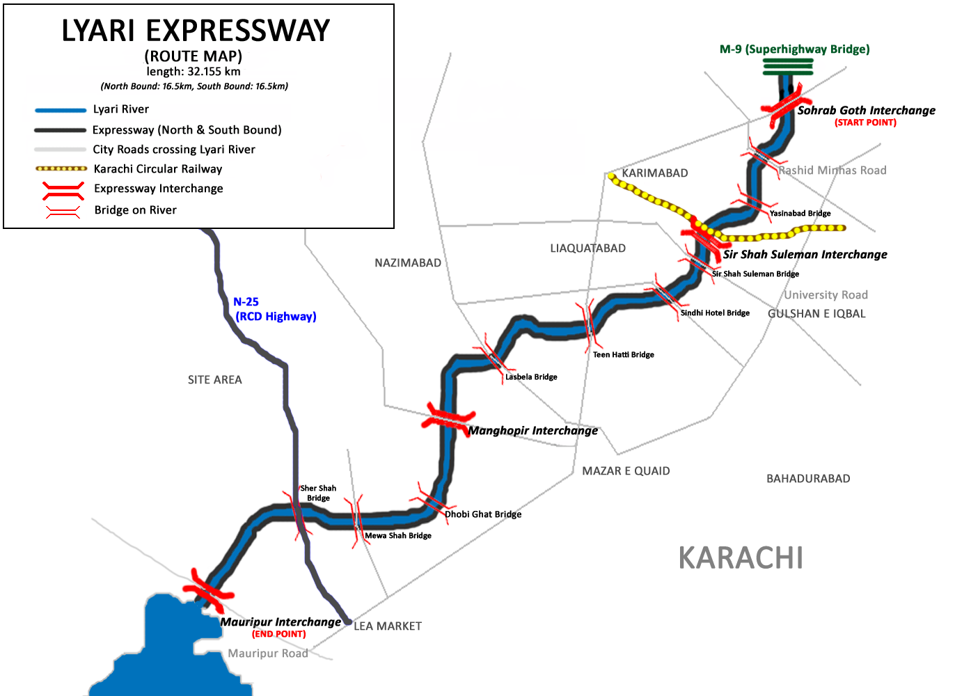 Lyari Expressway, Karachi, Pakistan - ROUTE MAP